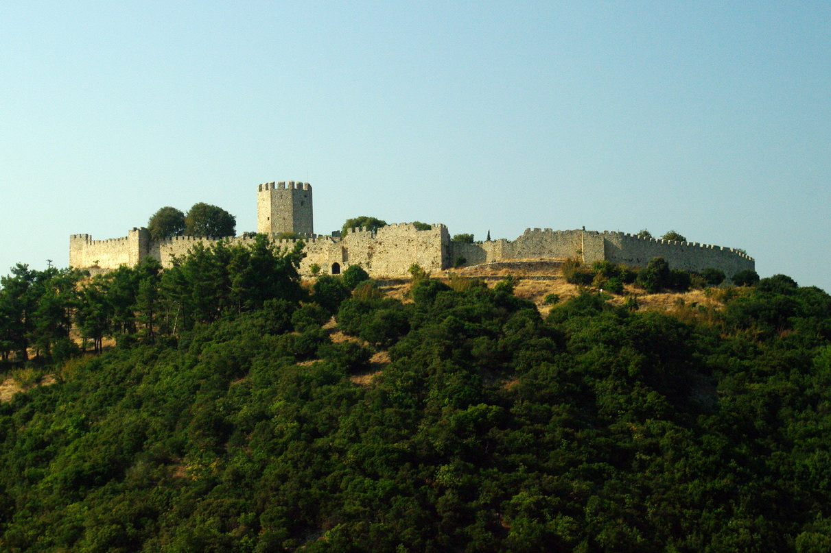 Festung Platamonas